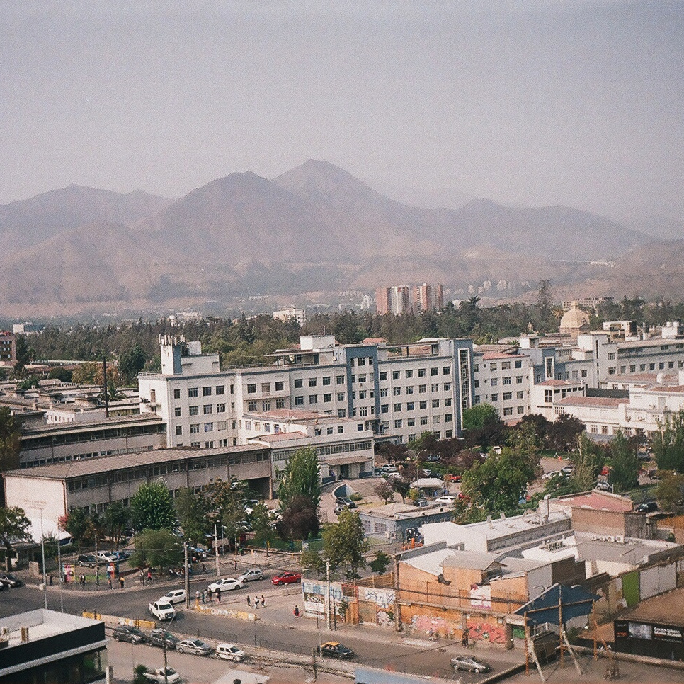 Fotografía del Hospital Clínico de la Universidad de Chile, visto desde un edificio al Suroeste (SO). Atrás se alcanza a apreciar una parte del cerro blanco. La fotografía fue tomada con cámara Lomo Smena 8M y película 35mm, posteriormente digitalizada.